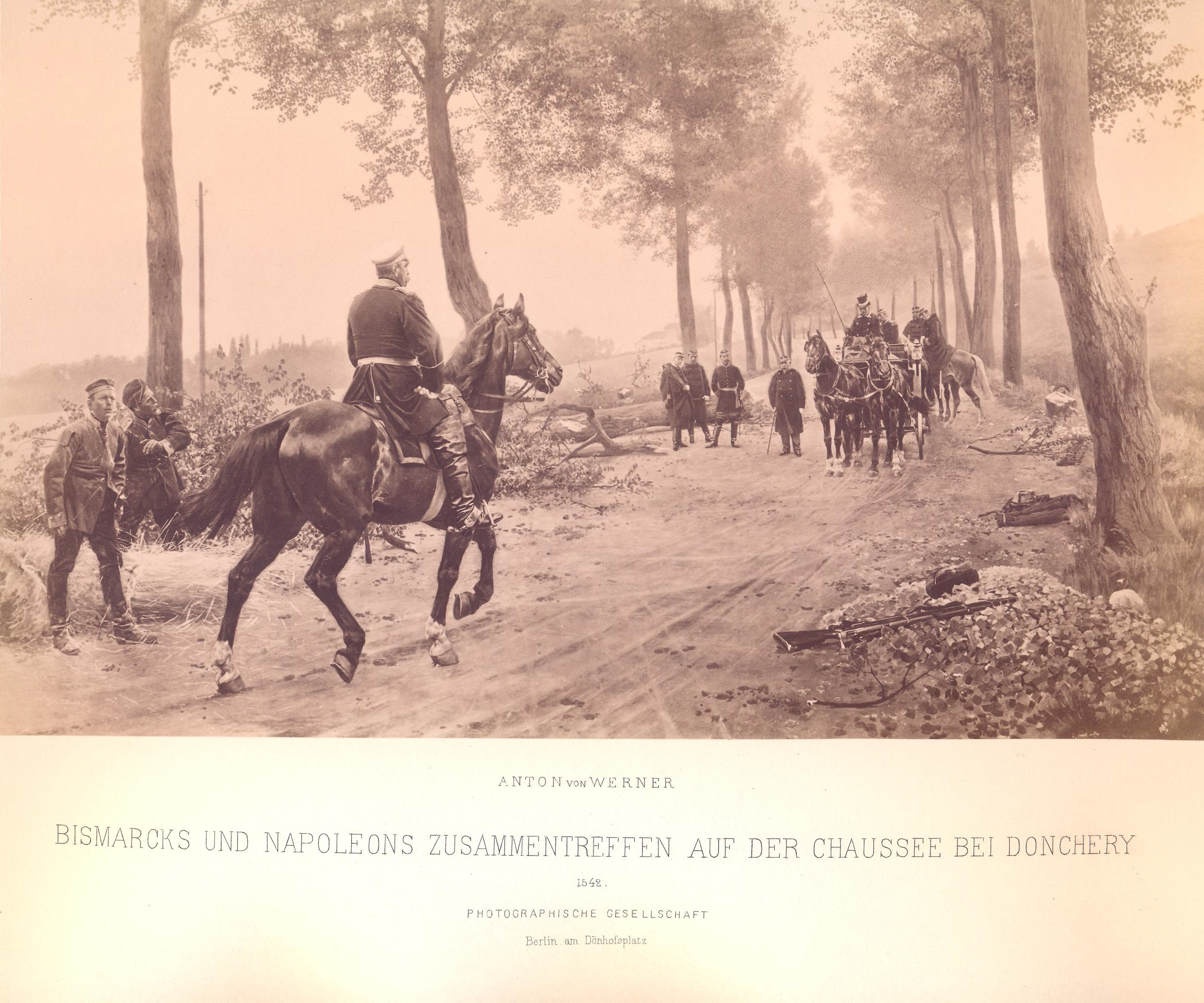 Ото фон Бисмарк, Албум със снимки на Бисмарк, издаден по случай 80-годишнината му в Берлин, 1895 г.